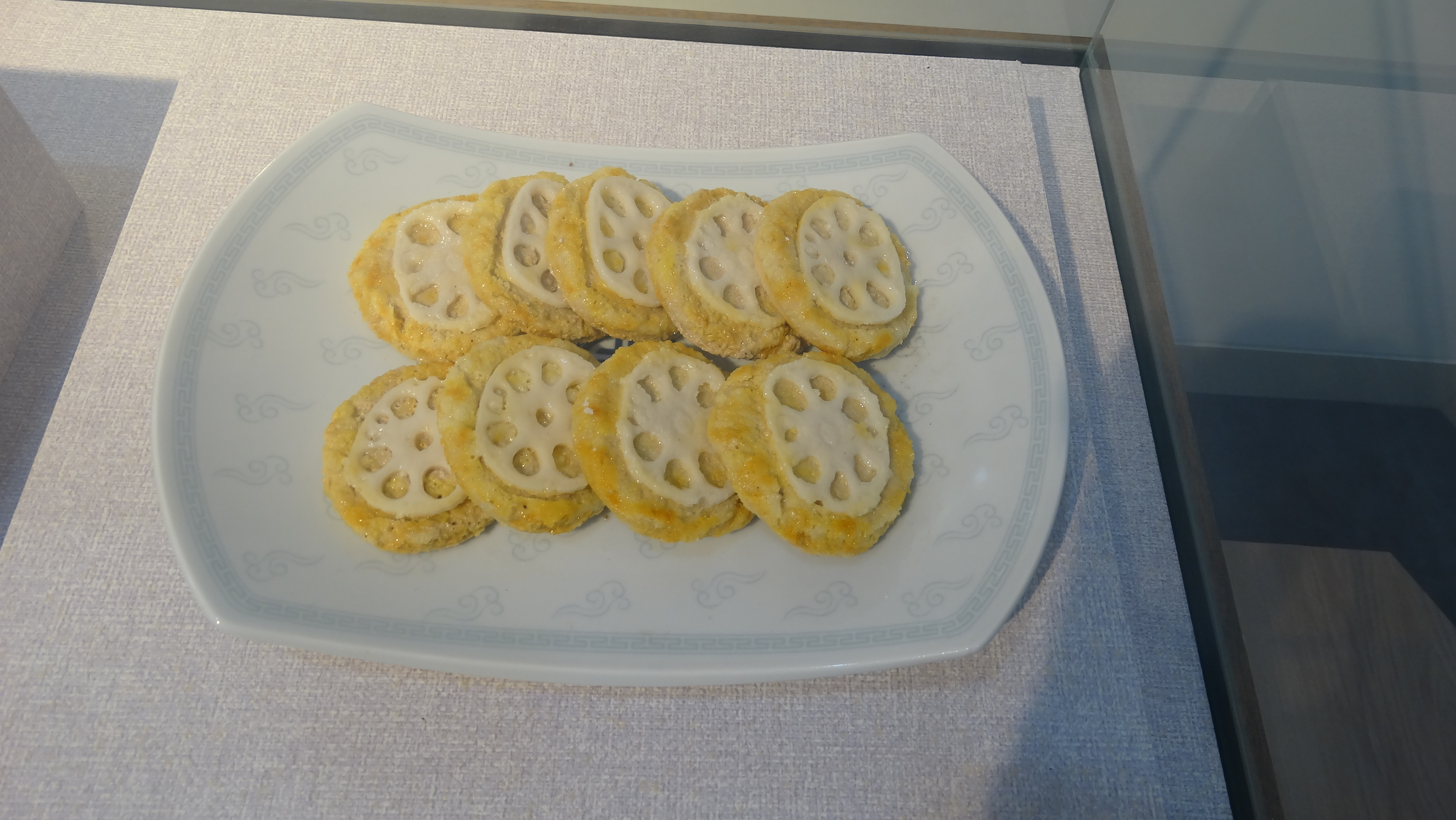 연근전 (1)